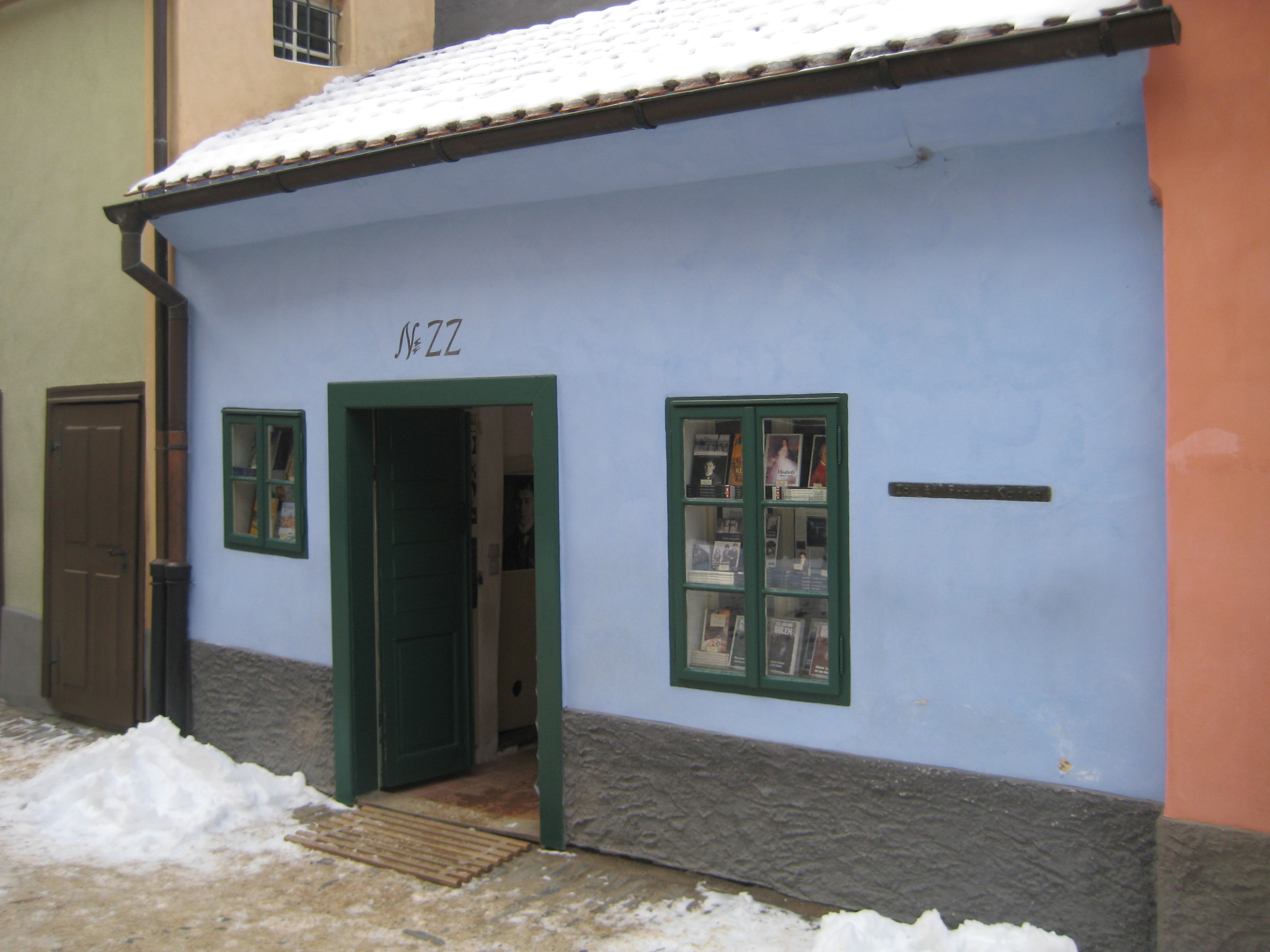 Casa in cui abitò Kafka nel Vicolo d'Oro